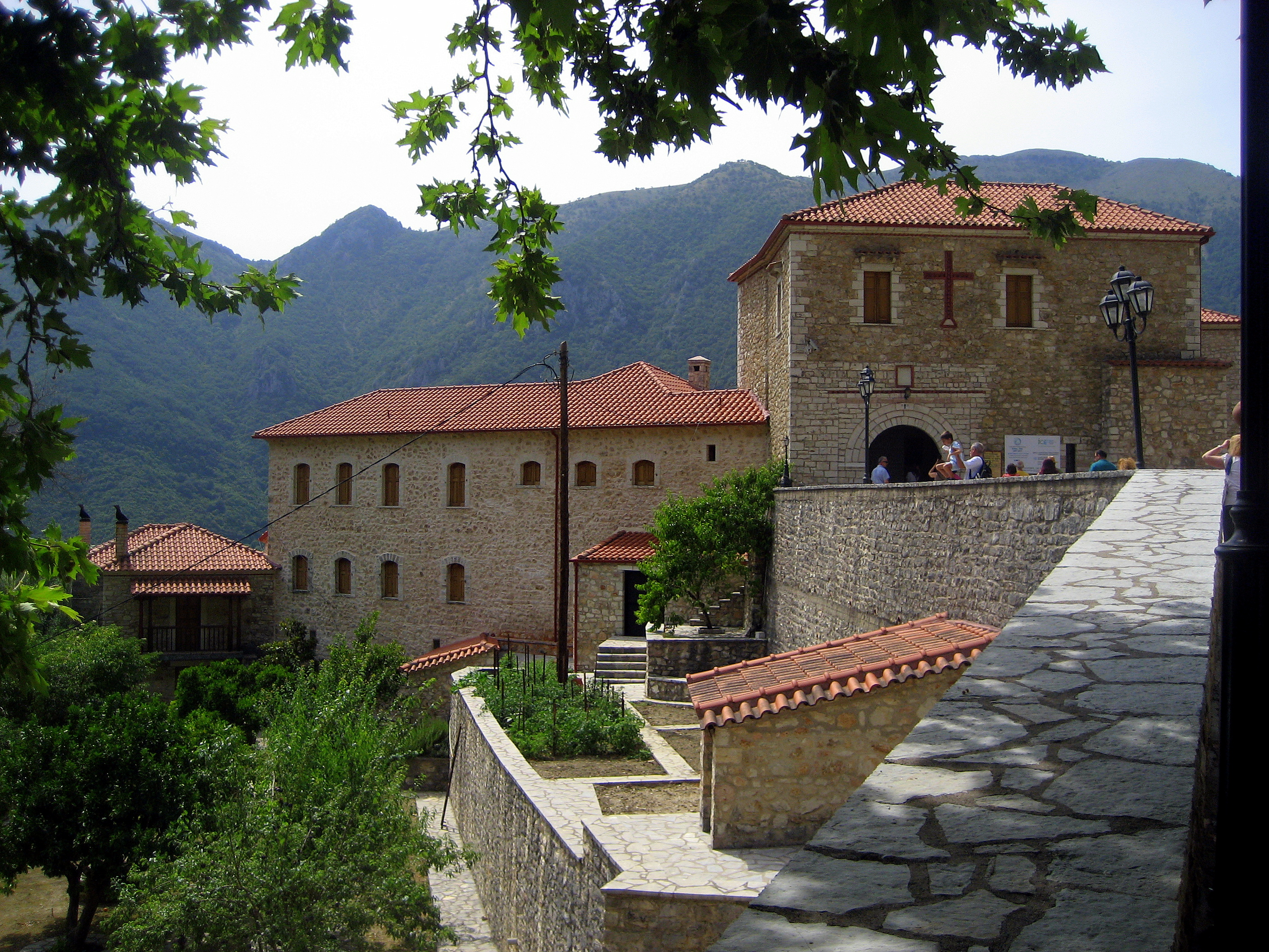 Ιερά Μονή Γηρομερίου«Ιερά Μονή Γηρομερίου»